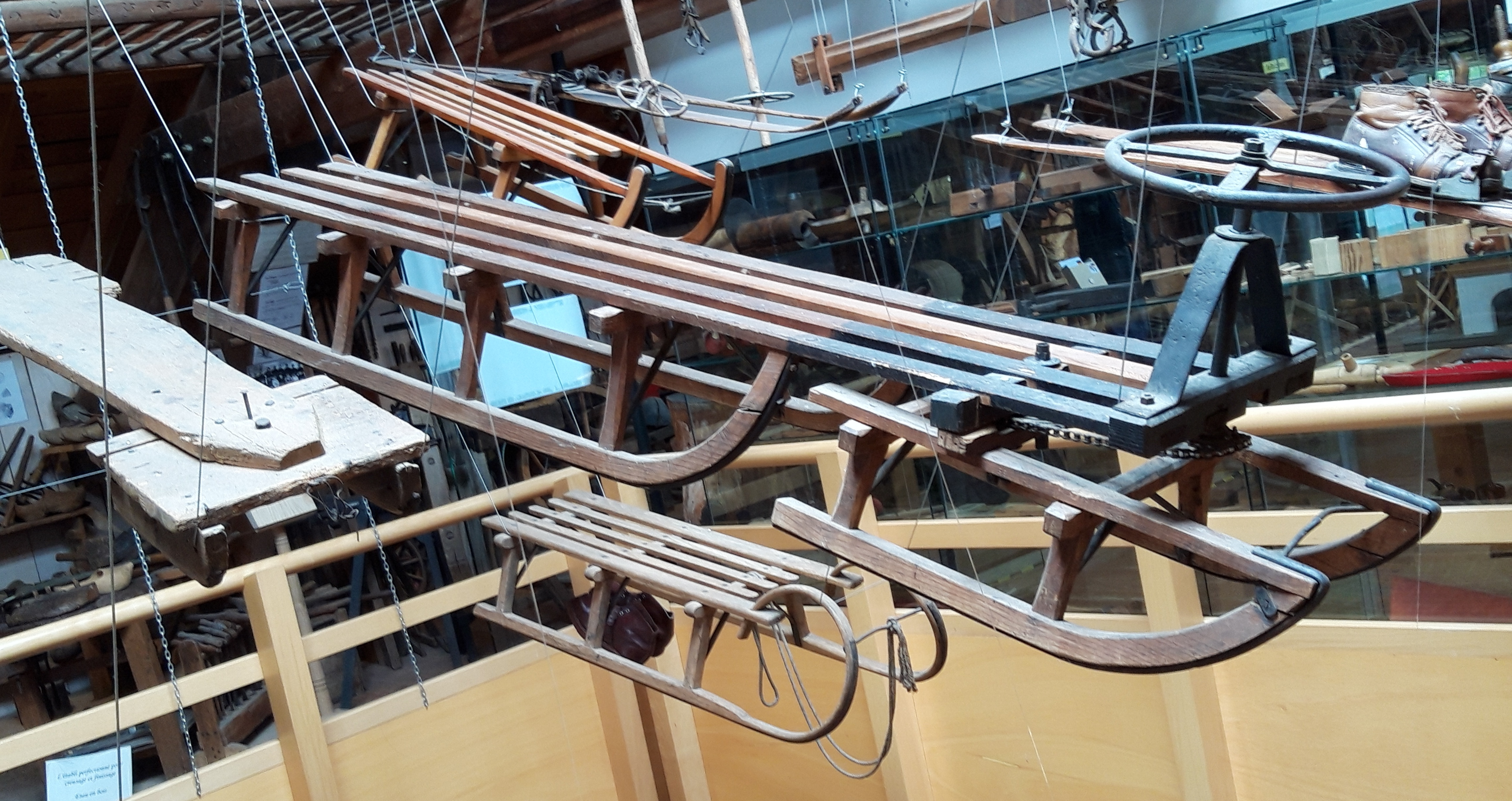 Bobsleighs datant du début du XXe siècle, musée des métiers du bois, Labaroche (Haut-Rhin)